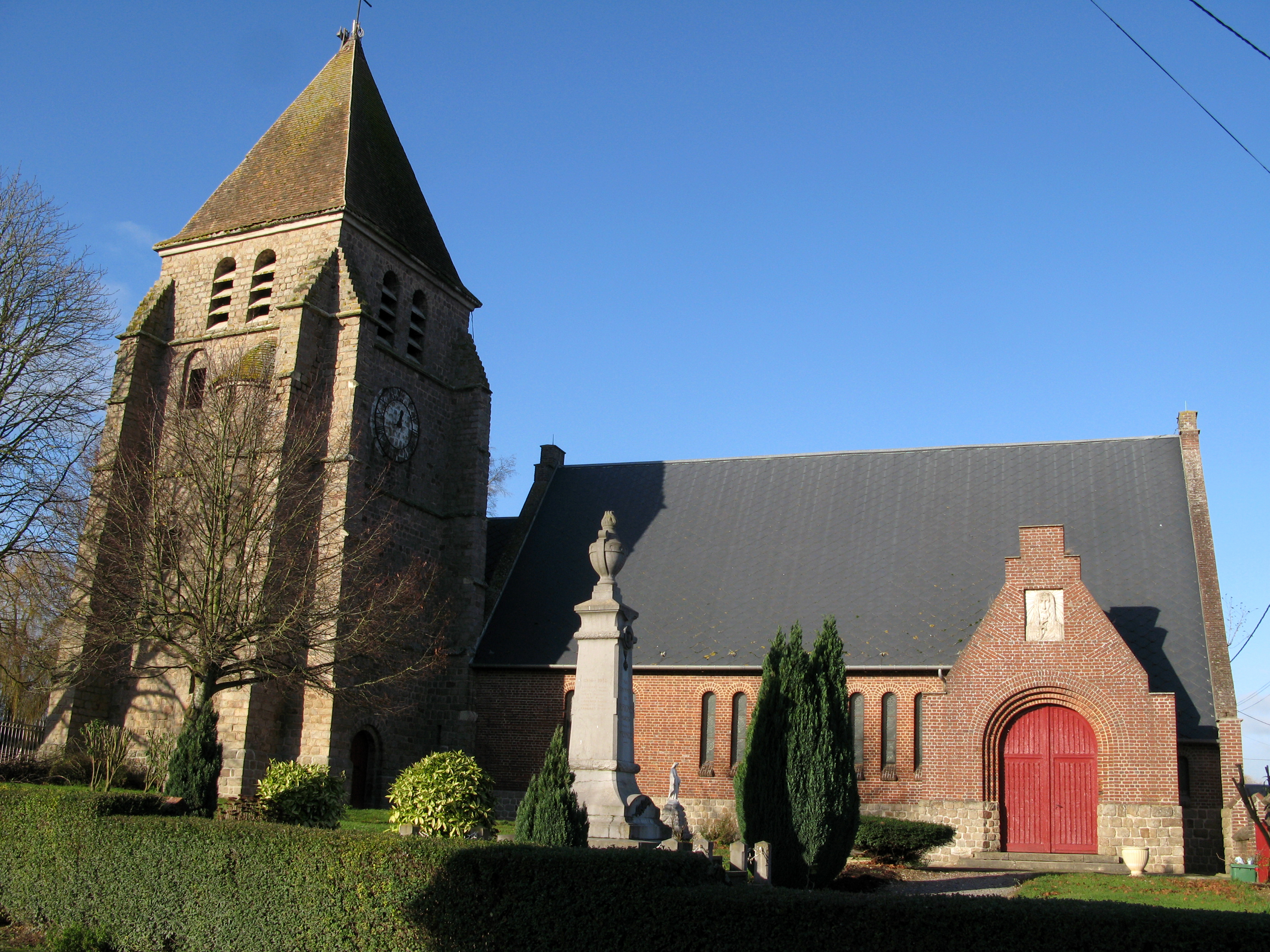 Vraignes-en-Vermandois (Somme, France) - L'église et le monument-aux-morts. .